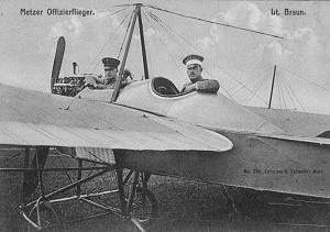 Metzer Offizierflieger ; Lt. Braun (1913)